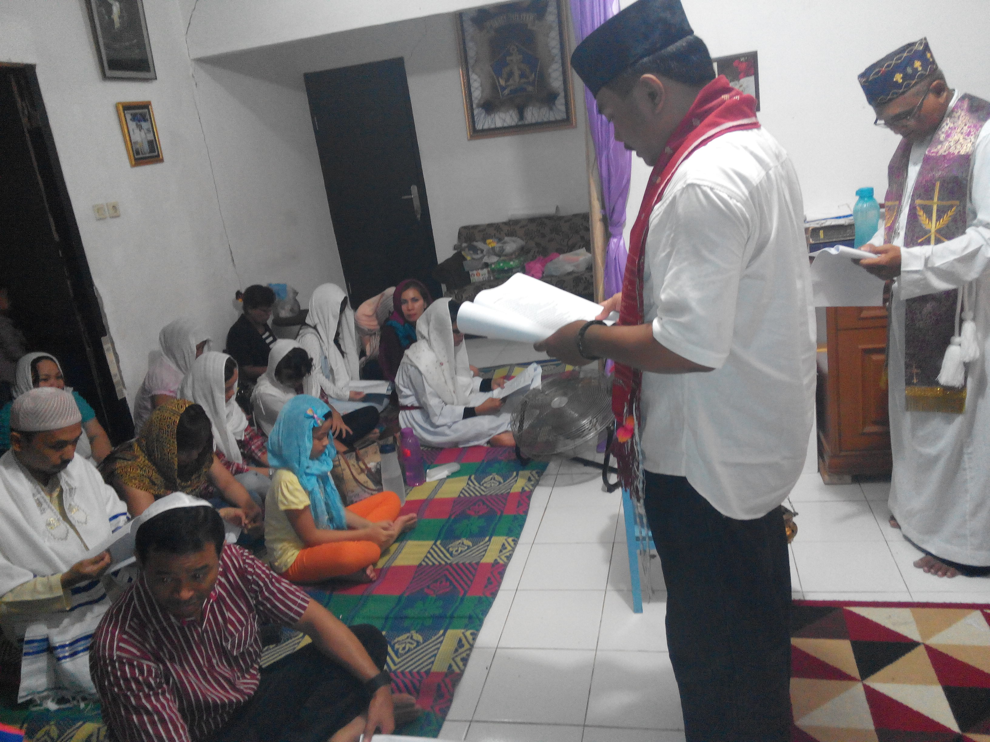 Jemaat sedang duduk diajar